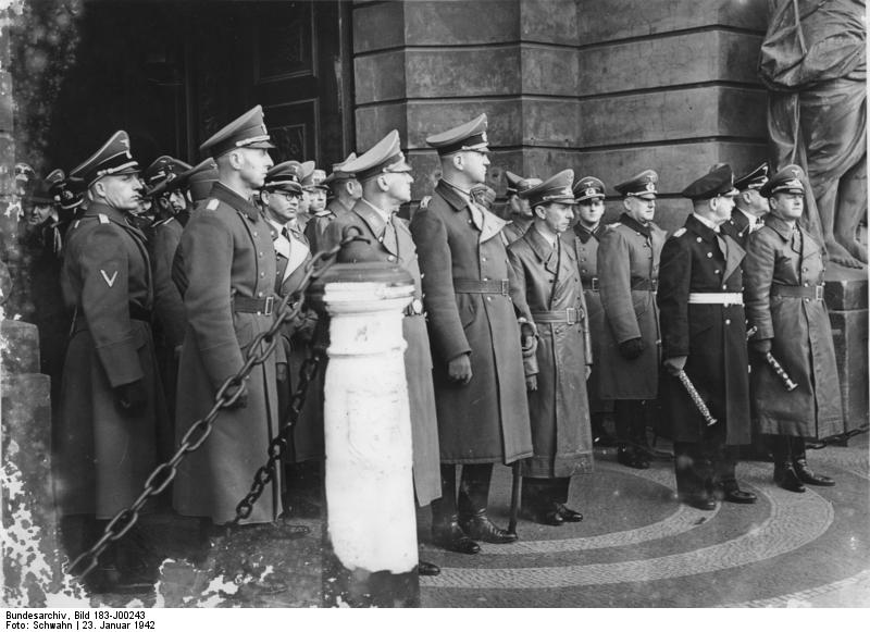 Berlin, Beerdigung Generalfeldmarschall v. Reichenau Scherl: Des Generalfeldmarschalls v. Reichenau letzte Fahrt. Während der Sarg mit den sterblichen Überresten auf die Lafette gehoben wird, haben die Trauergäste vor dem Zeughaus Aufstellung genommen. Wir bemerken unter ihnen Reichsminister Dr. Frick, hinter im Reichsleiter Bouhler ferner Generaloberst Fromm, Reichsminister Dr. Goebbels, Grossadmiral Raeder und Generalfeldmarschall Milch. Fot. Schwahn 23.1.42 [Wilhelm Frick, Philipp Bouhler, Friedrich Fromm, Joseph Goebbels, Erich Raeder, Erhard Milch] Abgebildete Personen: Frick, Wilhelm Dr.: NSDAP, MdR, Reichsinnenminister, 1946 hingerichtet, Deutschland Bouhler, Philipp: Reichsleiter, Beauftragter für das Euthanasie-Programm, Deutschland (GND 11627266x) Fromm, Friedrich: Generaloberst, Ritterkreuz (RK), Heer, Deutschland (GND 118843338) Goebbels, Joseph: Reichsminister für Volksaufklärung und Propaganda, Gauleiter Berlin, Deutschland Milch, Erhard: Generalfeldmarschall, Ritterkreuz (RK), Luftwaffe, Deutschland (GND 118582402) Raeder, Erich: Großadmiral, Oberbefehlshaber der Kriegsmarine, Deutschland (GND 118743511) zu Grabe getragen: Reichenau, Walter von: Generalfeldmarschall, Ritterkreuz (RK), Heer, Chef des Wehrmachtsamtes, Deutschland (GND 123390699)